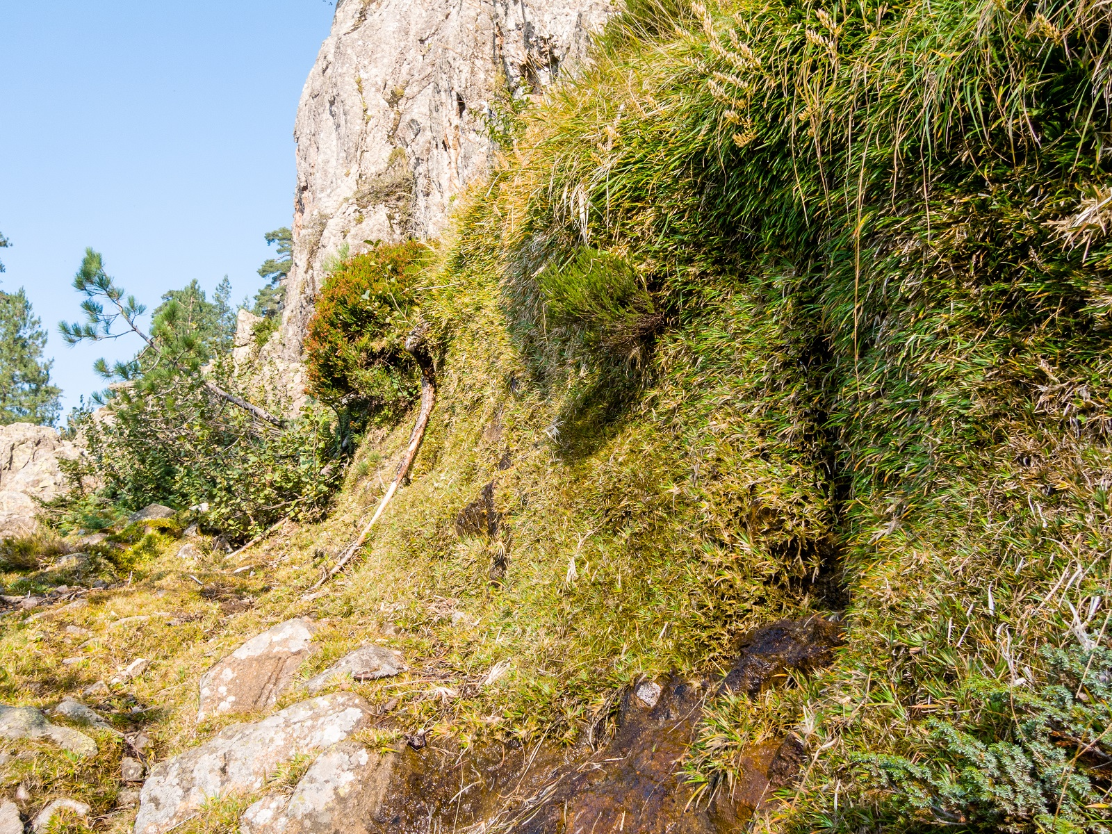 Pozzine de pente dans zone de sources au col de Cuccavara, Évisa, Corse-du-Sud, septembre 2011.